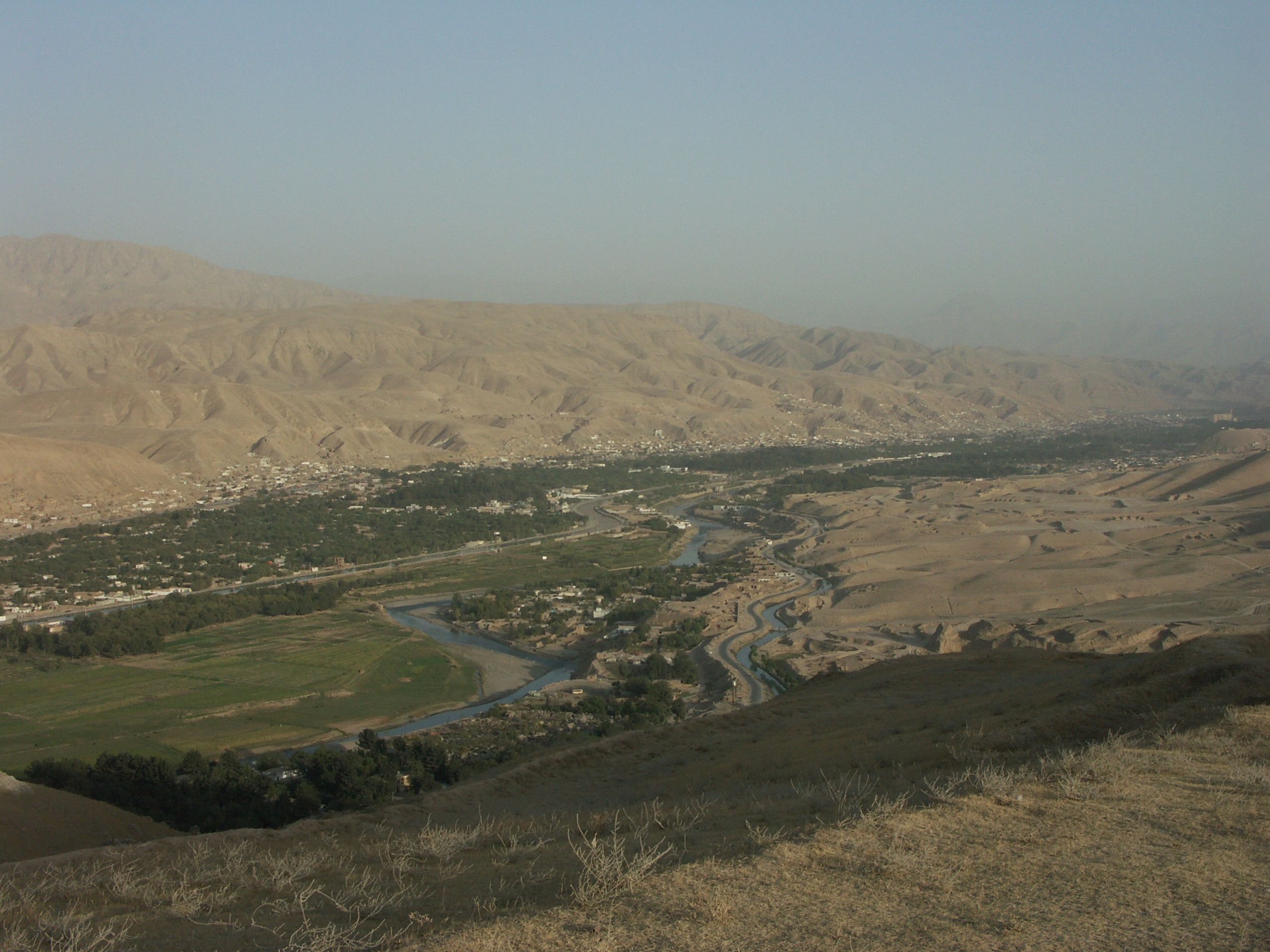 Blick vom OP North ins Tal nach Pol-e-Khumri